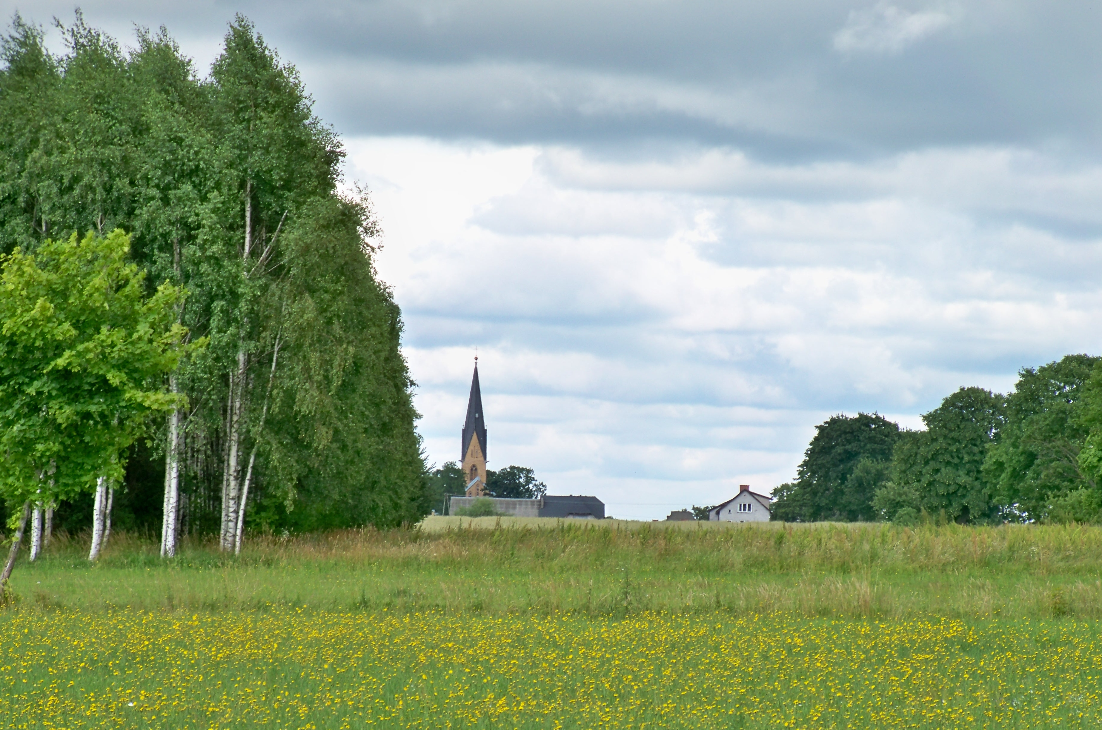 Pola pod Rozogami k. Szczytna